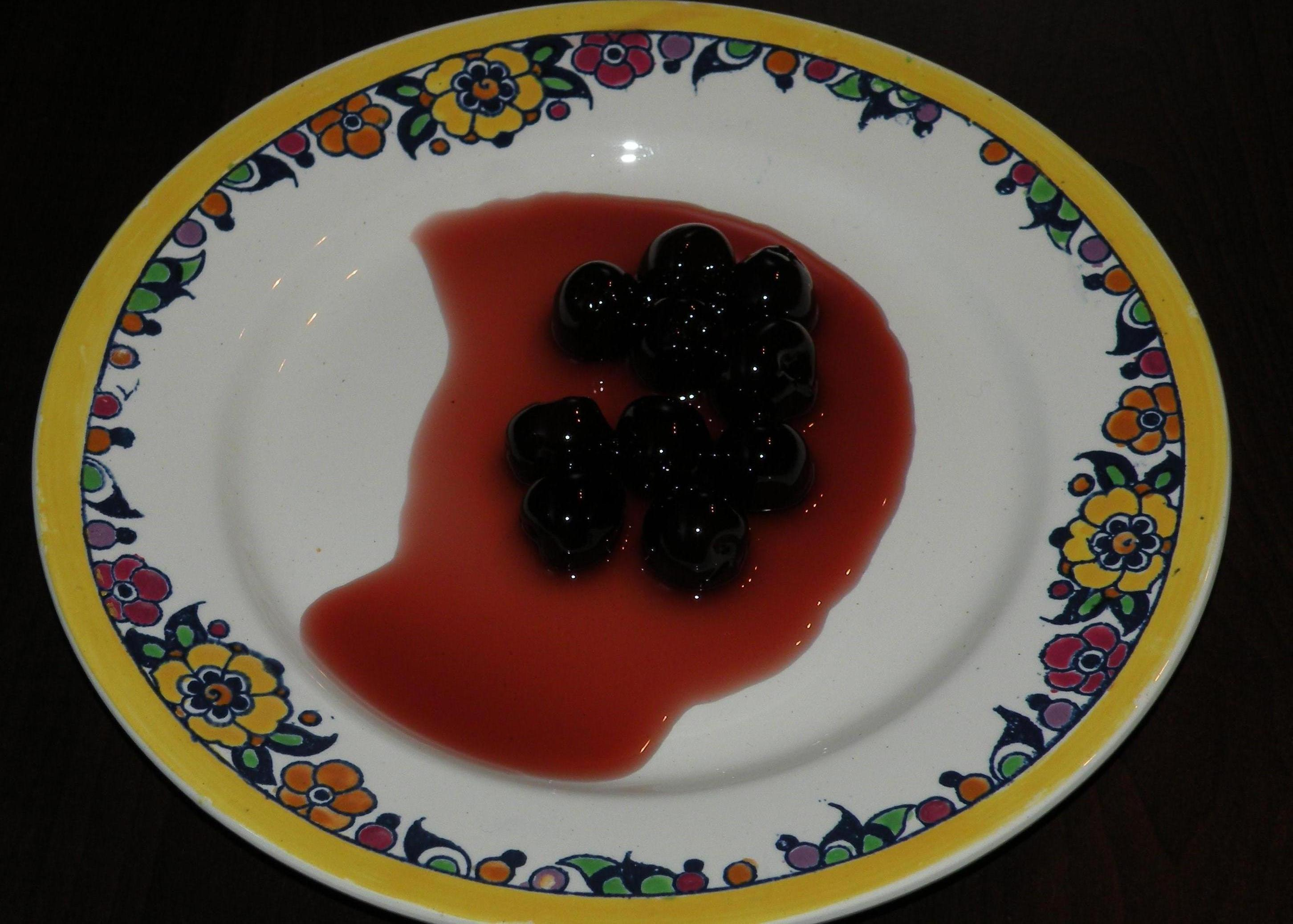 amarena : griotte confit